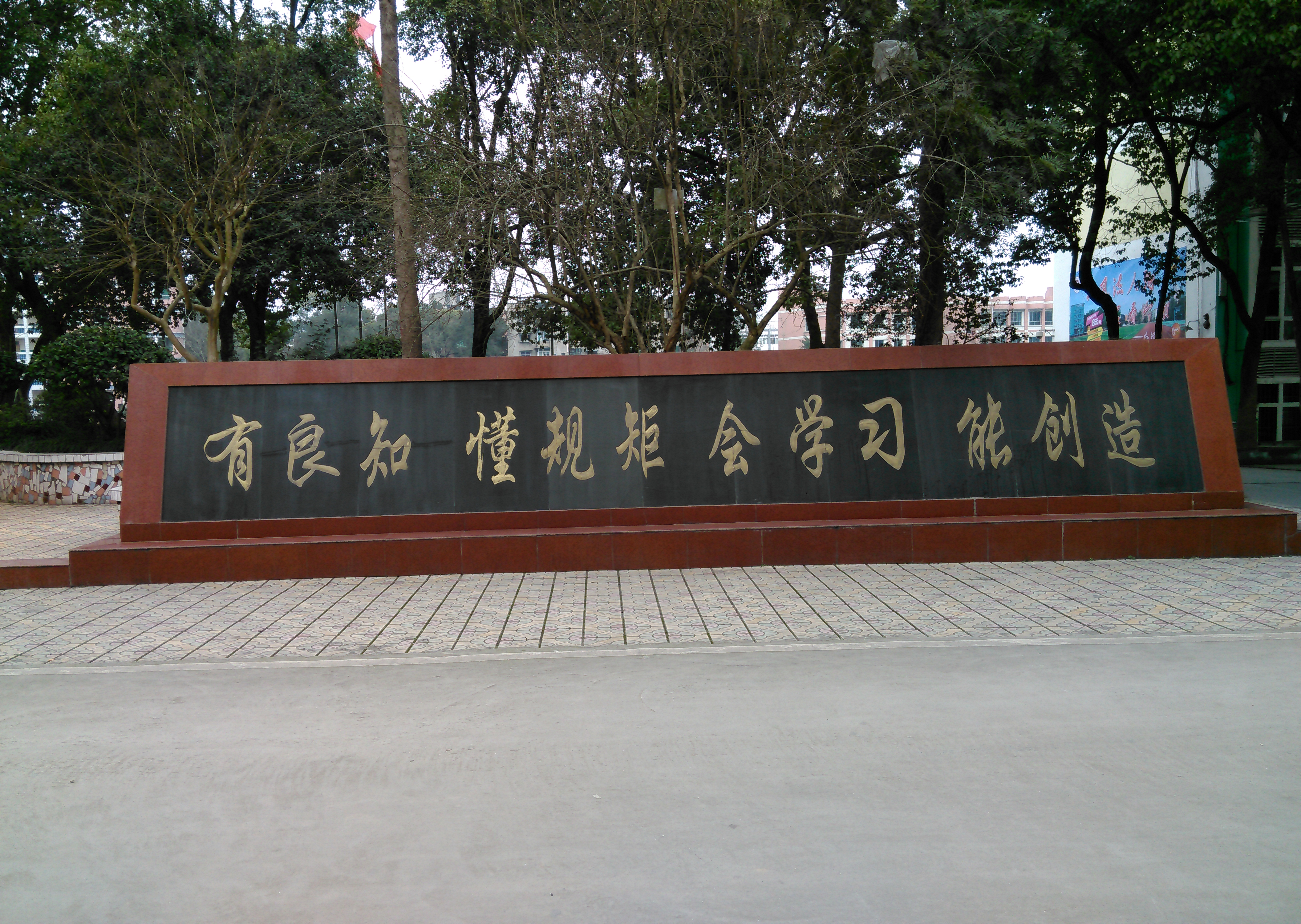 我授权维基百科和其他用户使用这个图片，这个图片是我自己的作品。